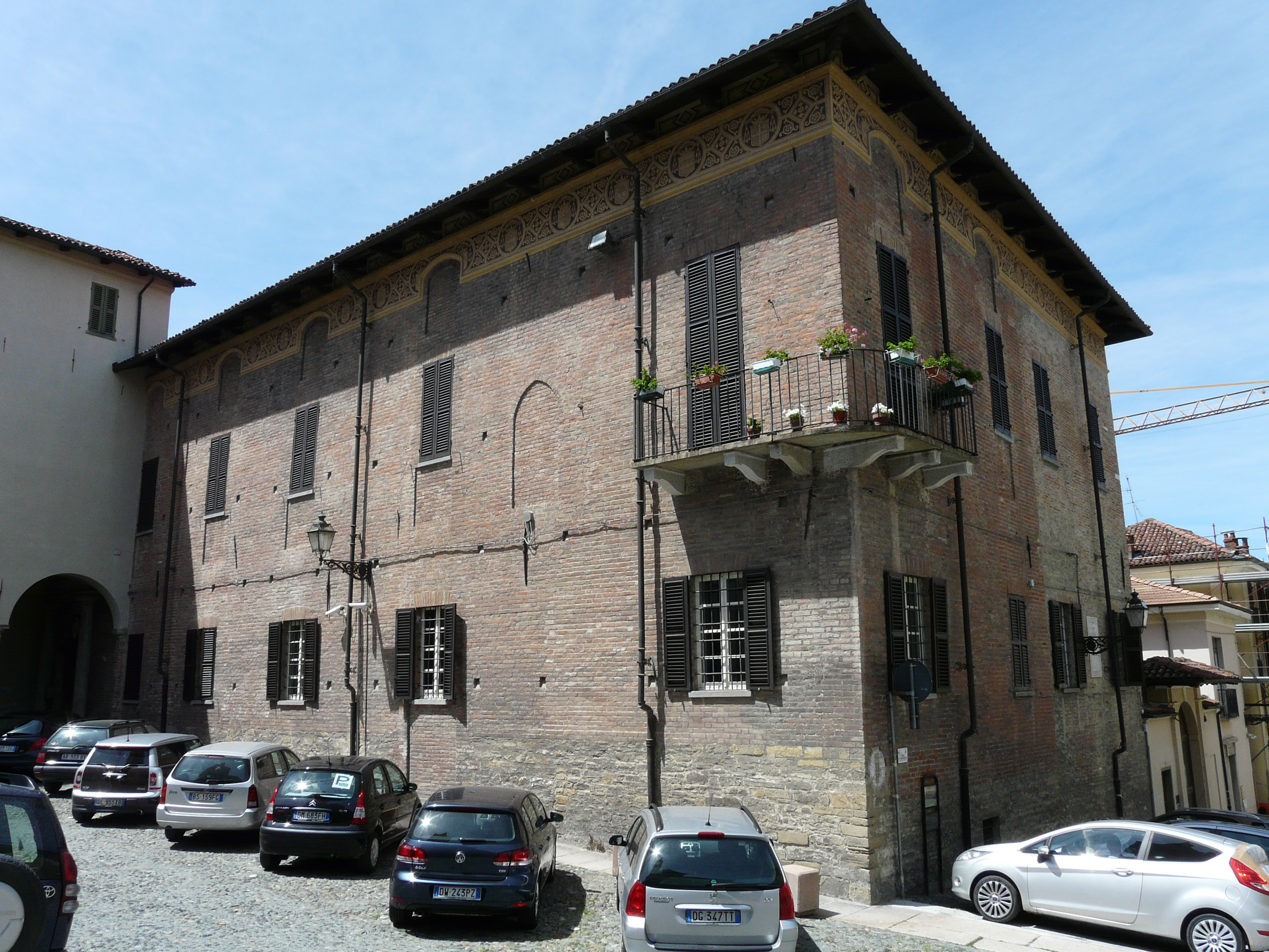 Palazzo vescovile, Acqui Terme, Piemonte, Italia